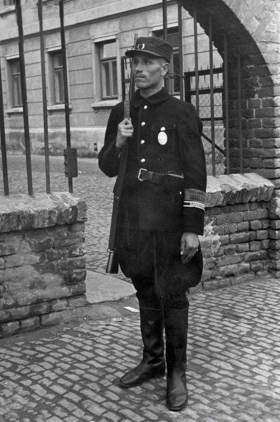 Funkcjonariusz Sonderdienstu przed posterunkiem w Lublinie w maju 1940.